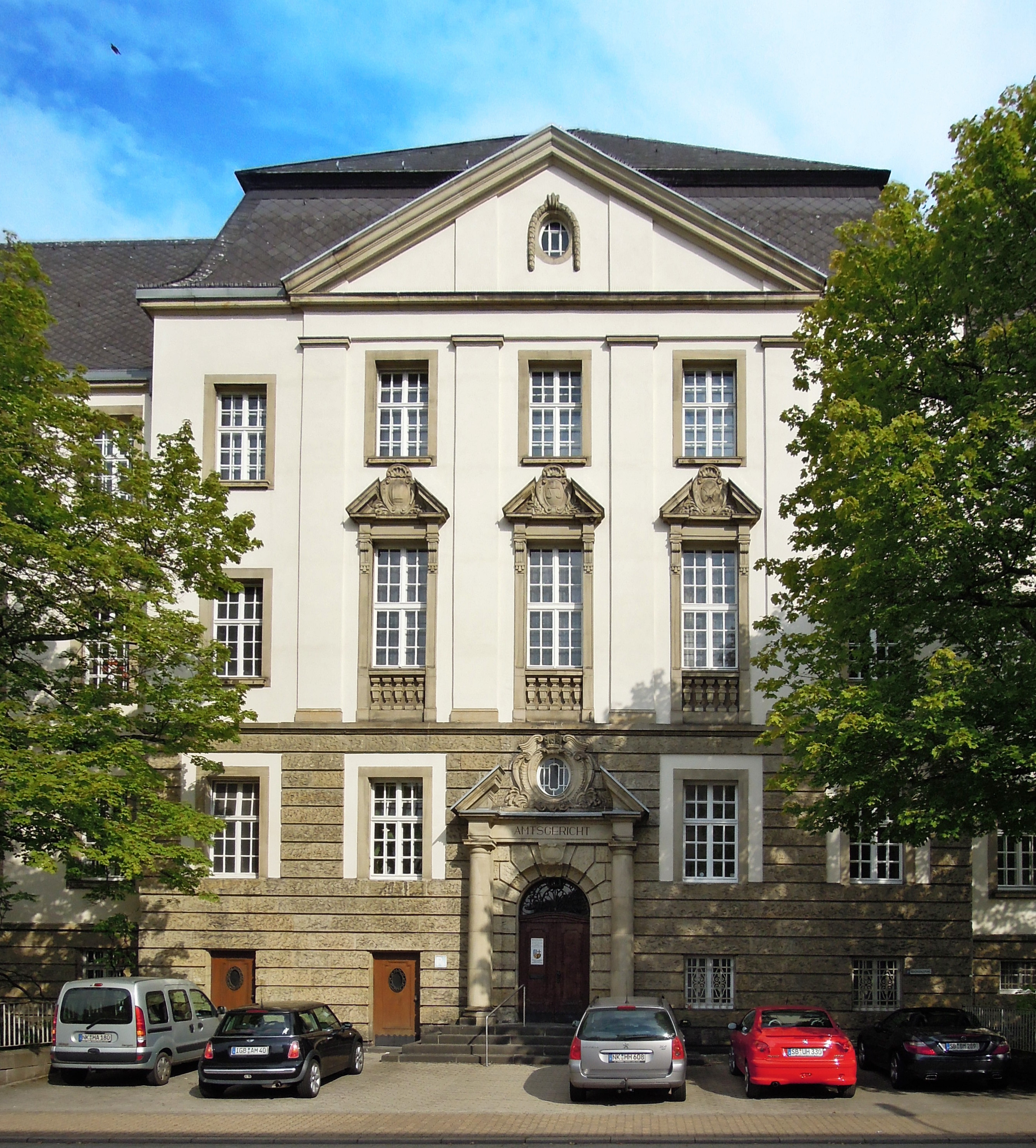 Vopeliusstraße 2, Amtsgericht, 1913 (Einzeldenkmal)